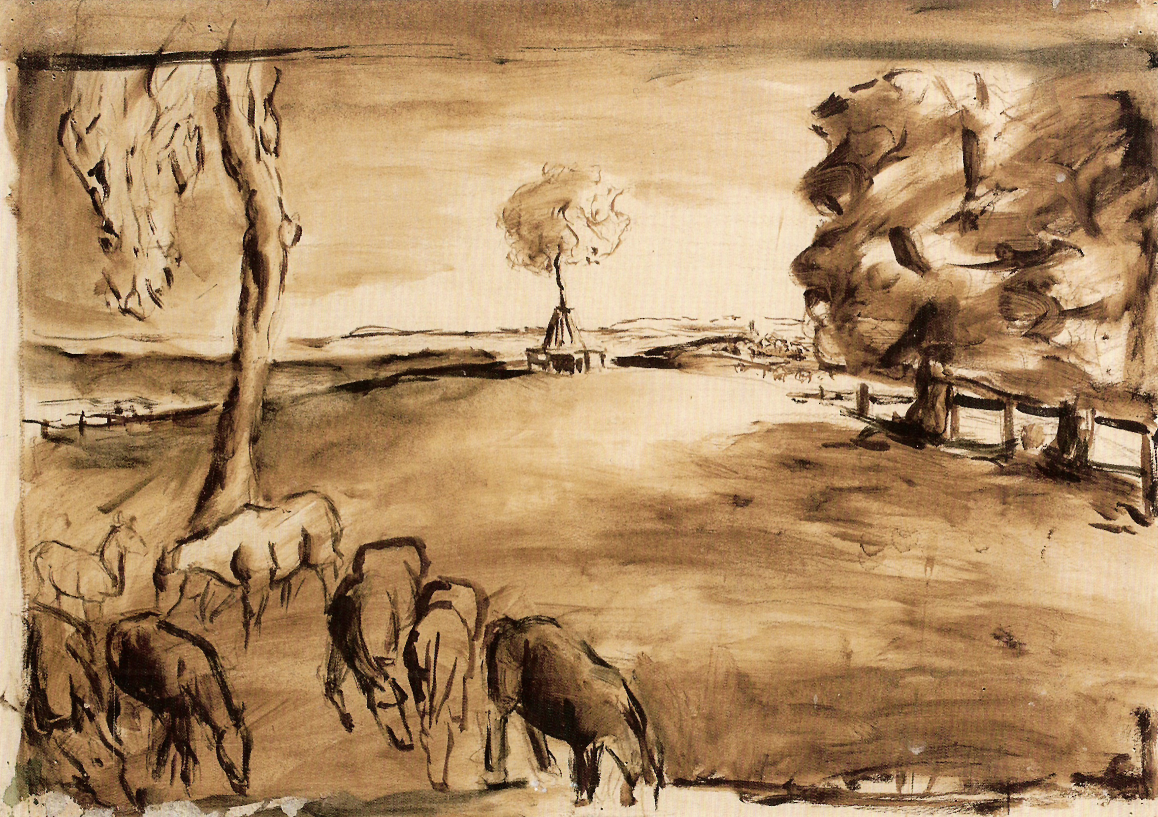 Pferdeweide (Zeichning laviert - Sepia)